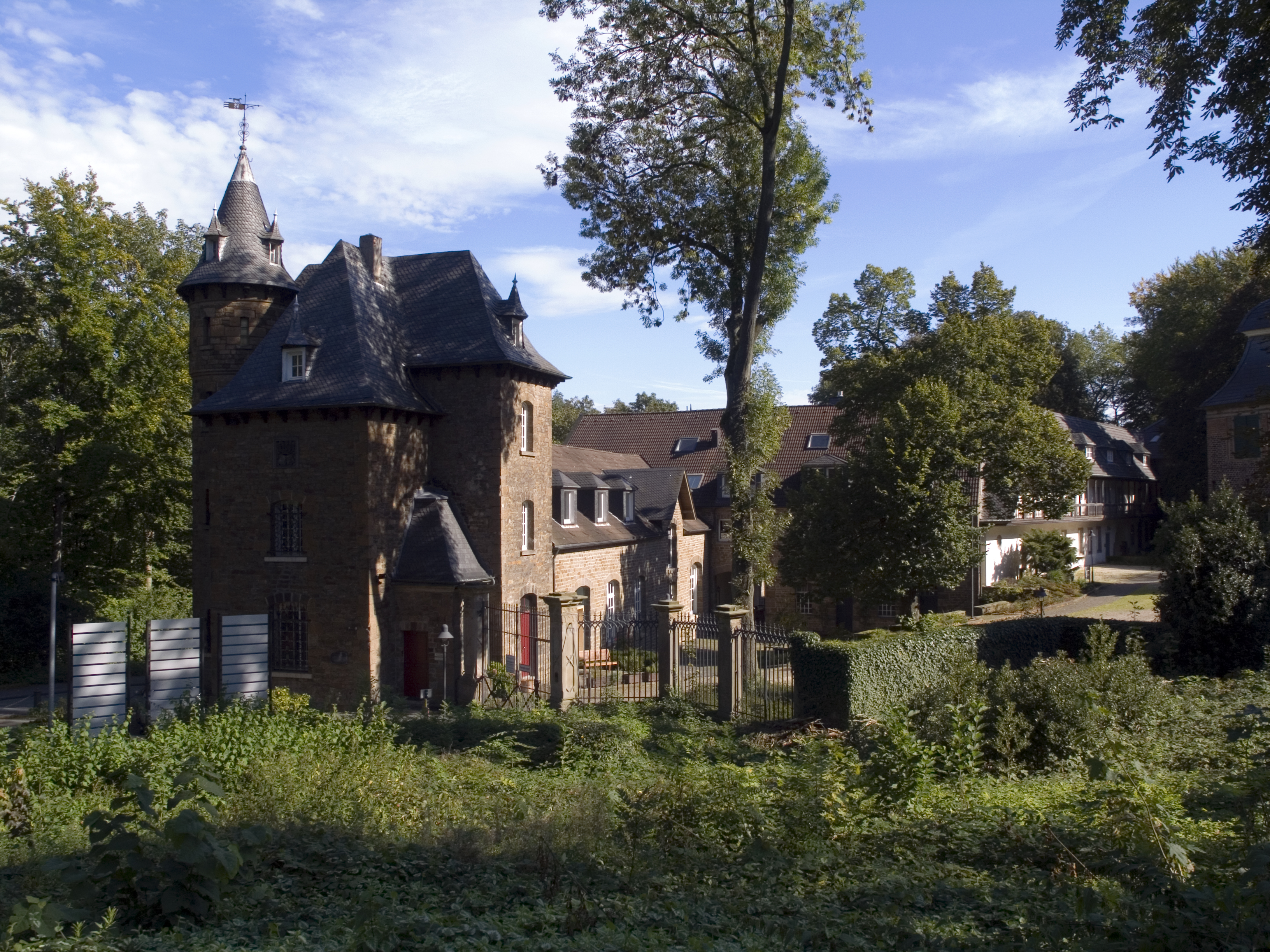 Torbau und Vorburg des Schlosses Schellenberg in Essen-Schellenberg, Ansicht von Westen